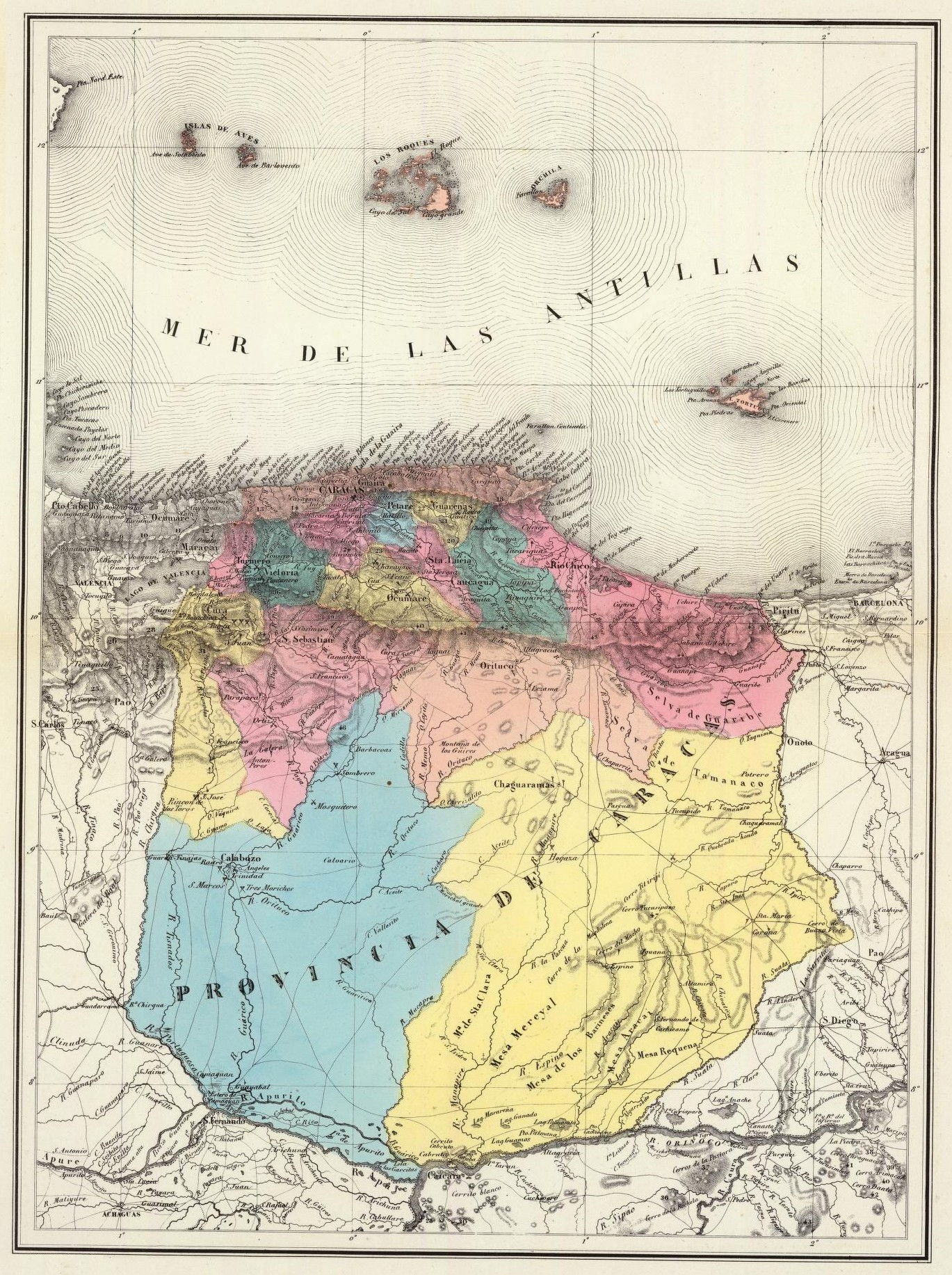 Provincia de Caracas. Tomado del "Atlas físico y político de la República de Venezuela", 1840.